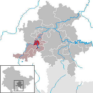 Unterweißbach in Thuringia - District Saalfeld-Rudolstadt